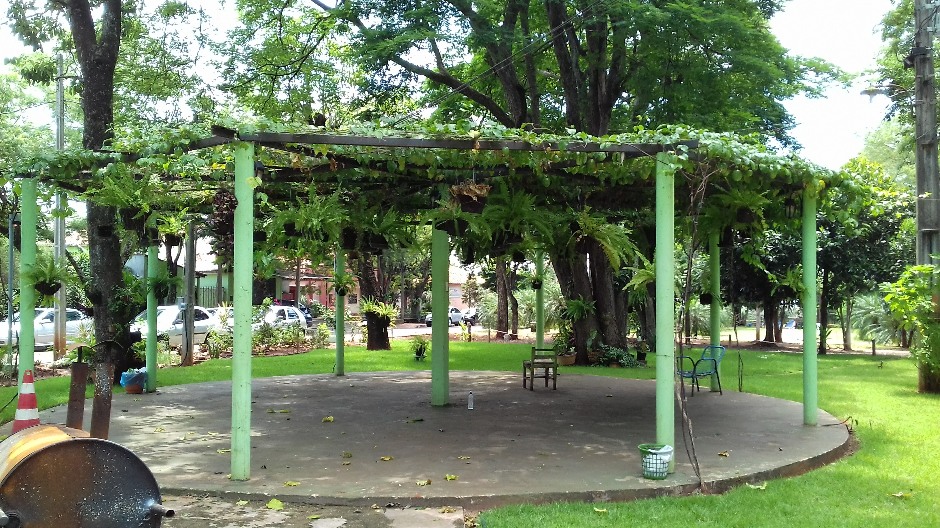 Plantas em Praça de Salto Del Guairá - Py